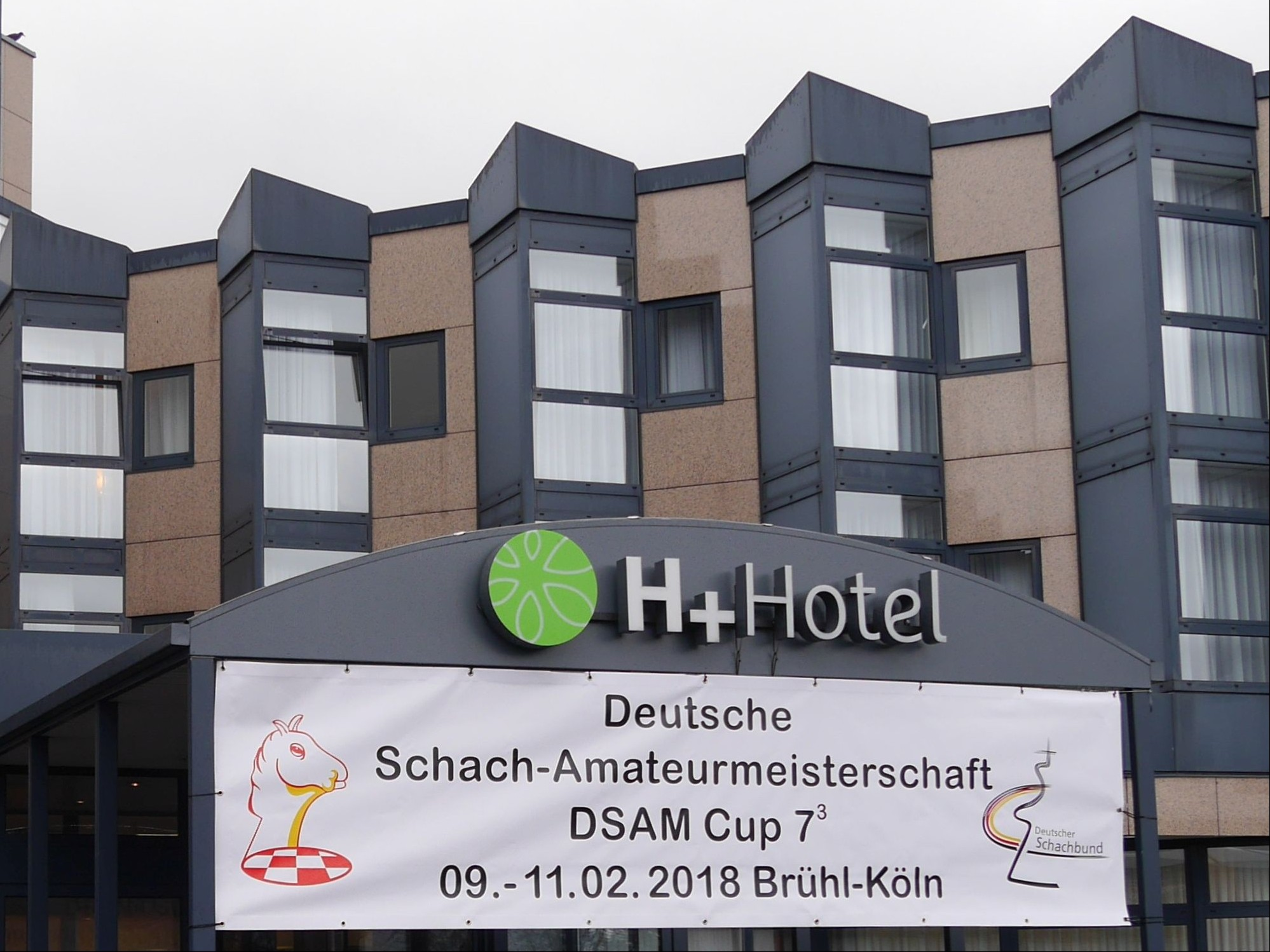 Spielort des Vorturniers in Brühl zur Deutschen Schach-Amateurmeisterschaft 2017/2018